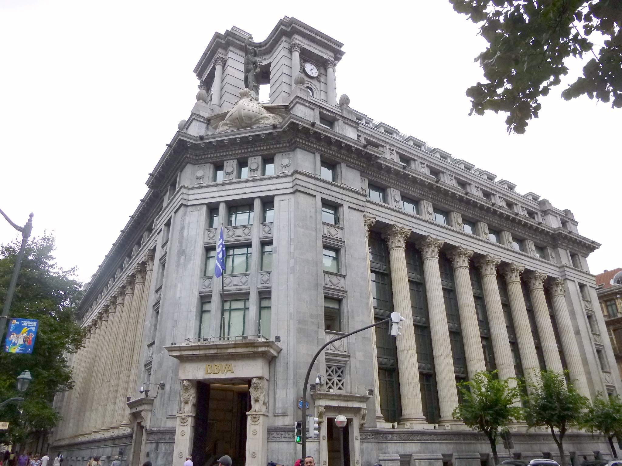 BBVA (ex Banco de Comercio), en Bilbao